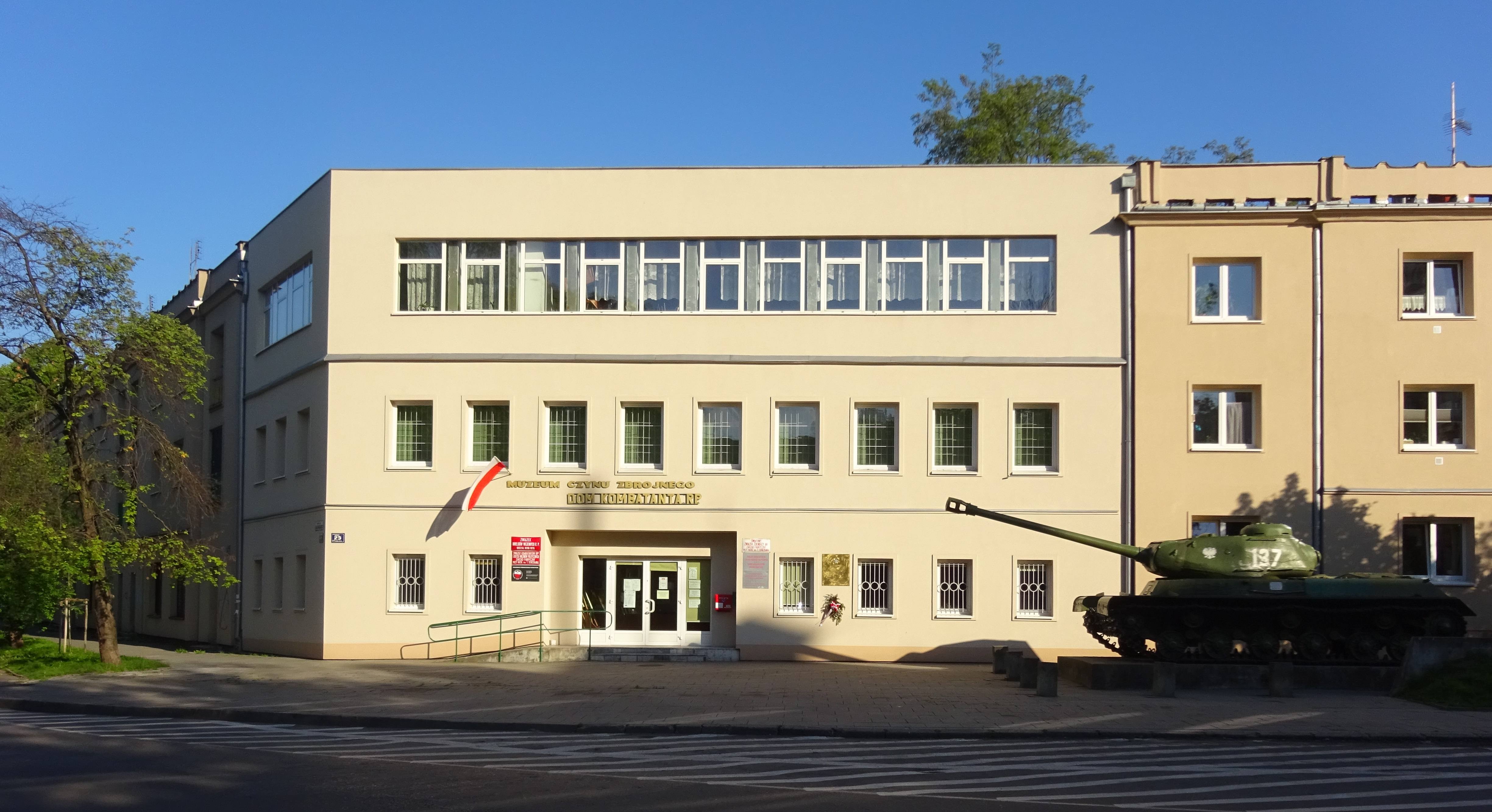 Muzeum Czynu Zbrojnego w Krakowie na Osiedlu Górali. Po remoncie, 2018.